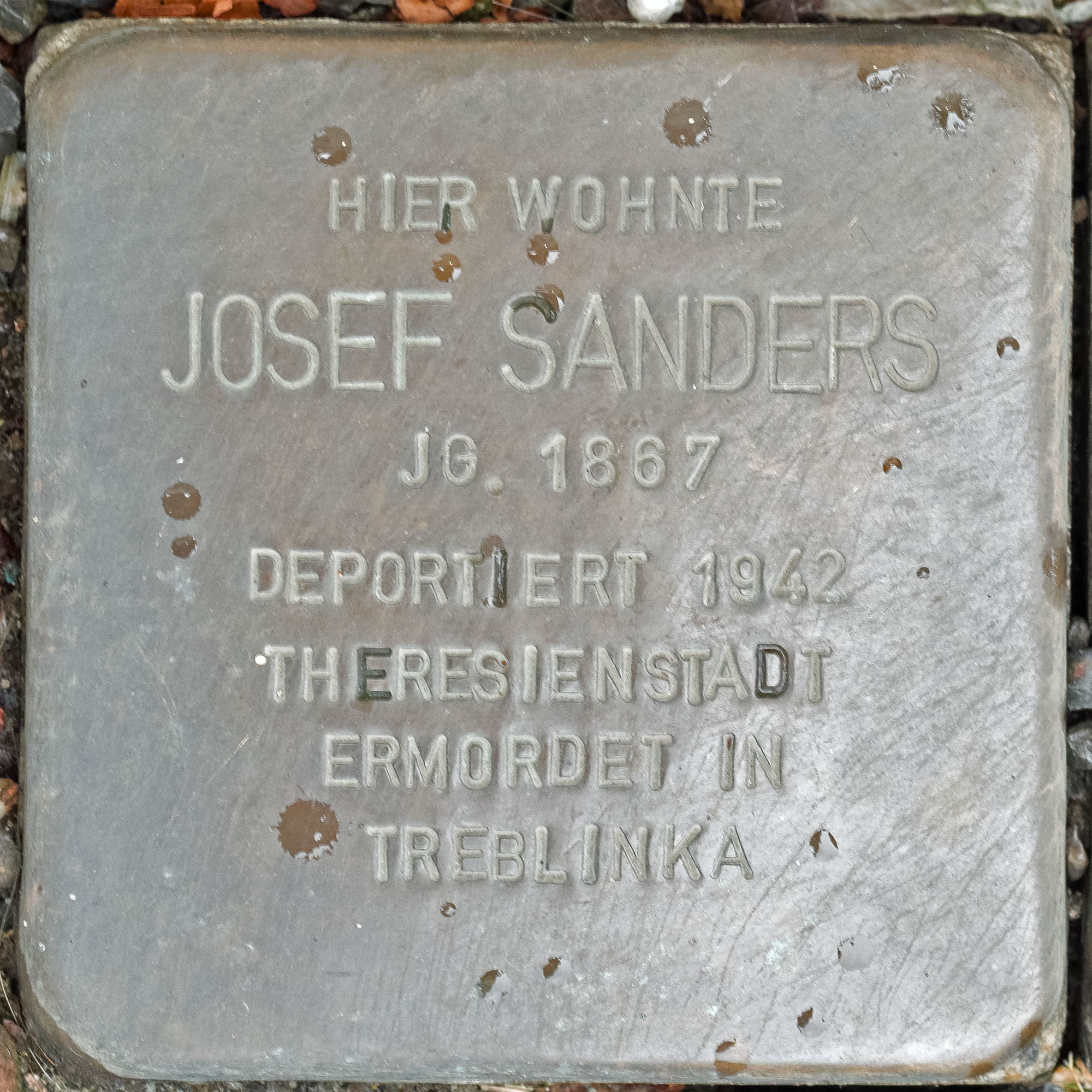 Stolpersteine Straelen: Sanders, Josef